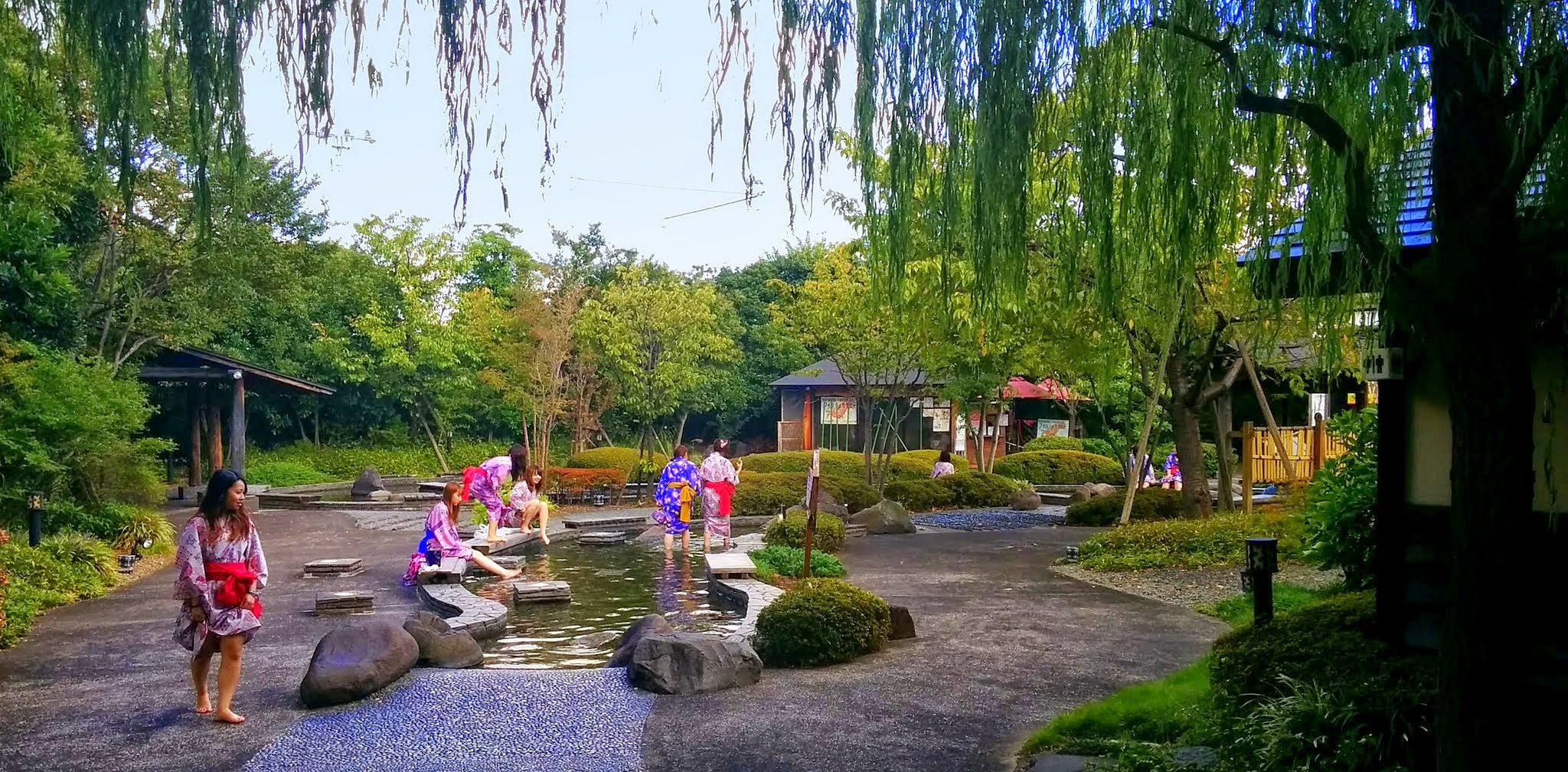 Außenbereich mit Fußmassagebecken des Ooedo Onsen Monogatari in Odaiba in Tokio This work by Ronny Siegel is licensed under a Creative Commons Attribution 4.0 International License. - You can freely use this work, any way you want including altering and/or selling if you call my name on your publication. You can find this picture also on my website